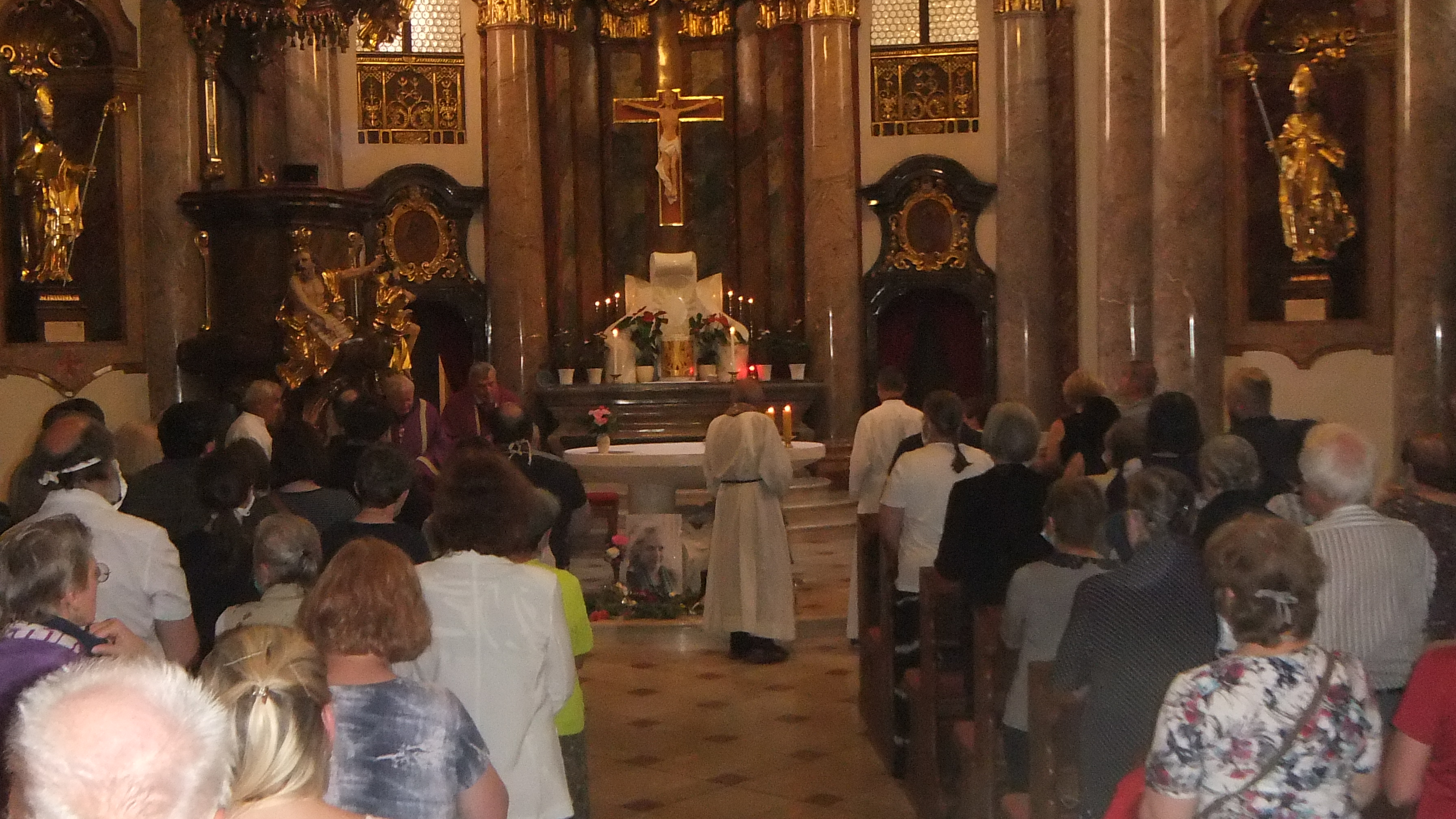 Rekviem za Markétu Procházkovou Lutkovou v kostele sv. Bartoloměje v Praze